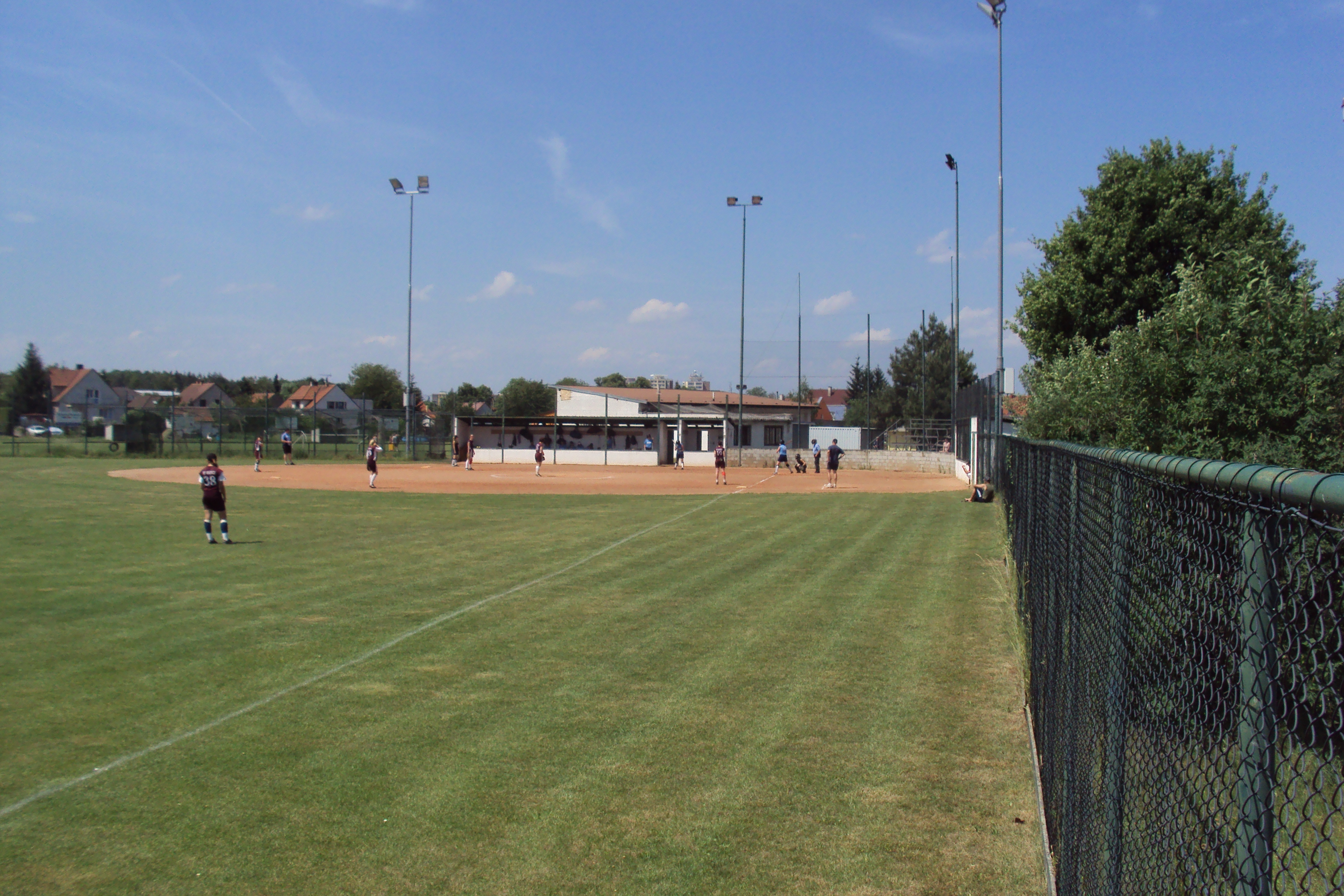 Softballové hřiště v Lobkovicích